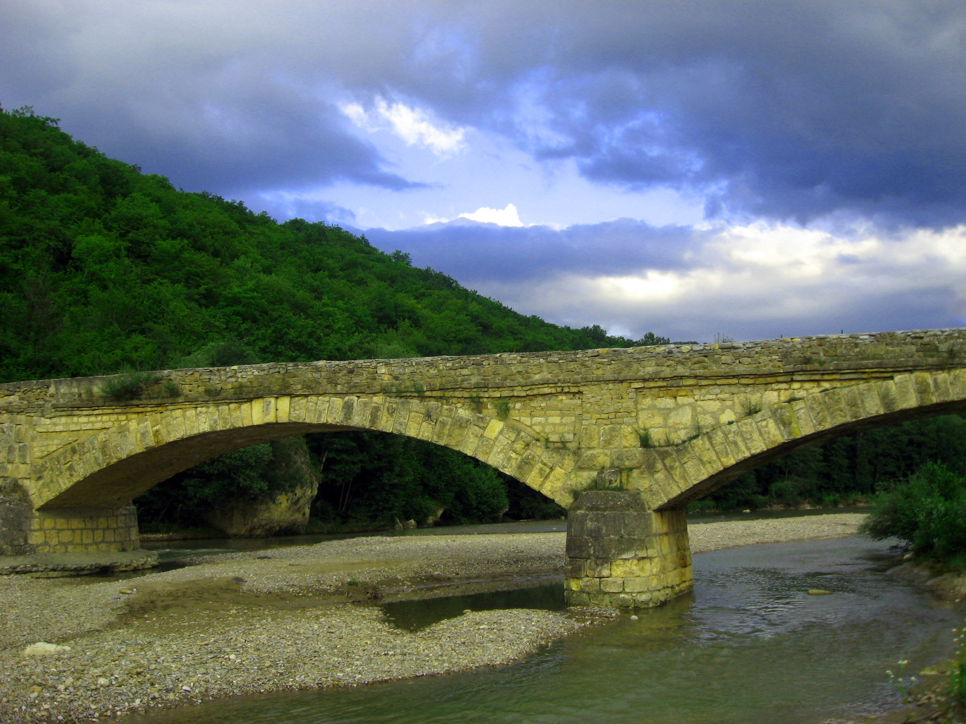 Река Дах, приток реки Белой